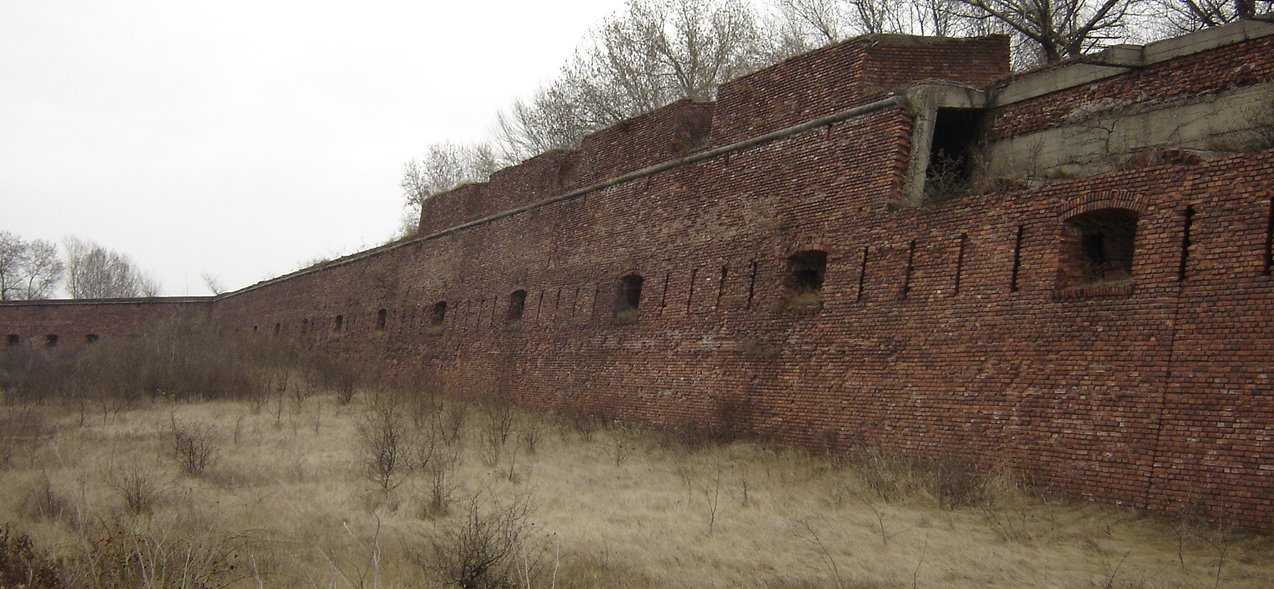 Complexul arhitectonic Ada- Kaleh